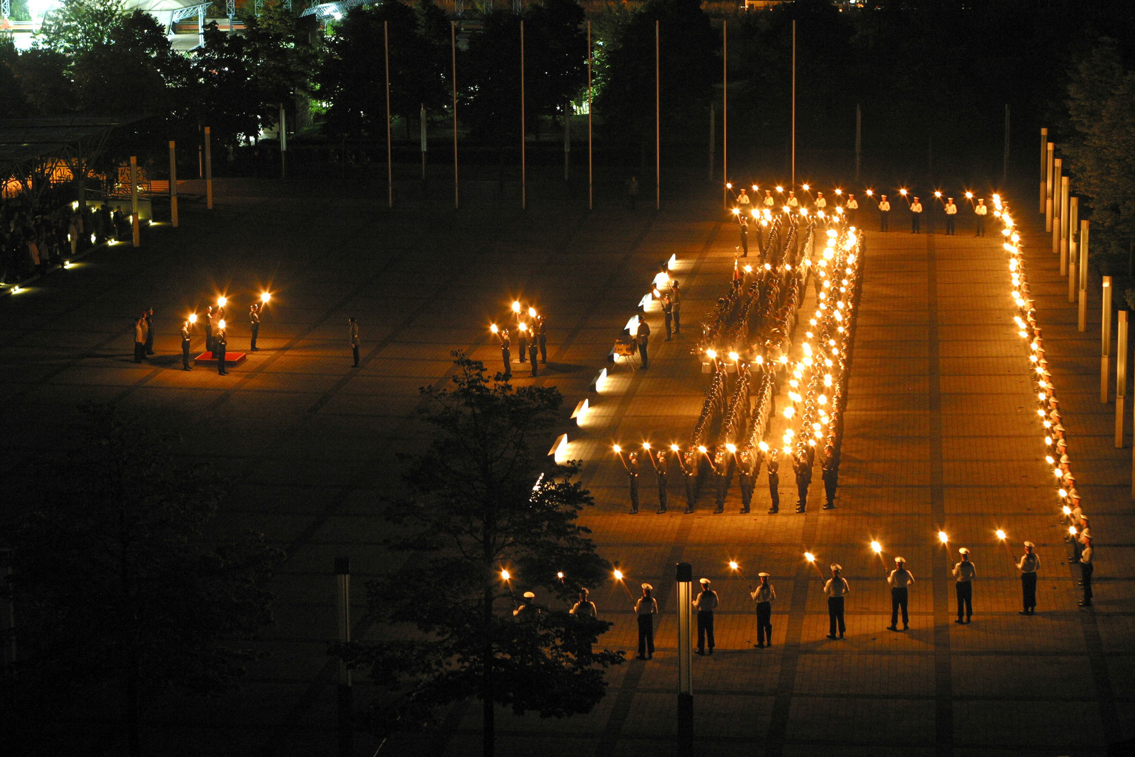 Großer Zapfenstreich auf dem „Münchner Platz“ im ersten Dienstsitz des Bundesministerium der Verteidigung in Bonn.